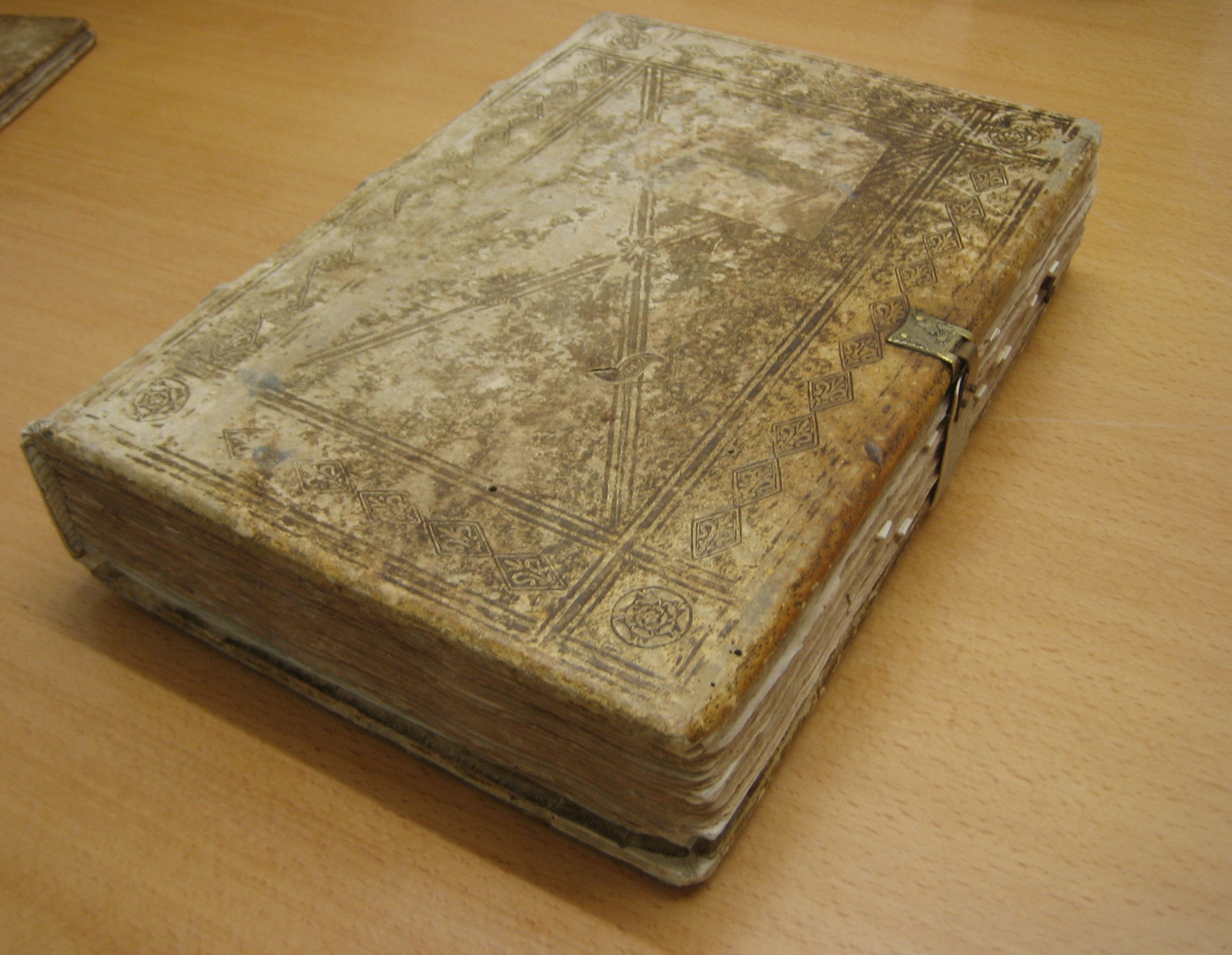 Die Edlibacher Zürcher Chronik (Original)